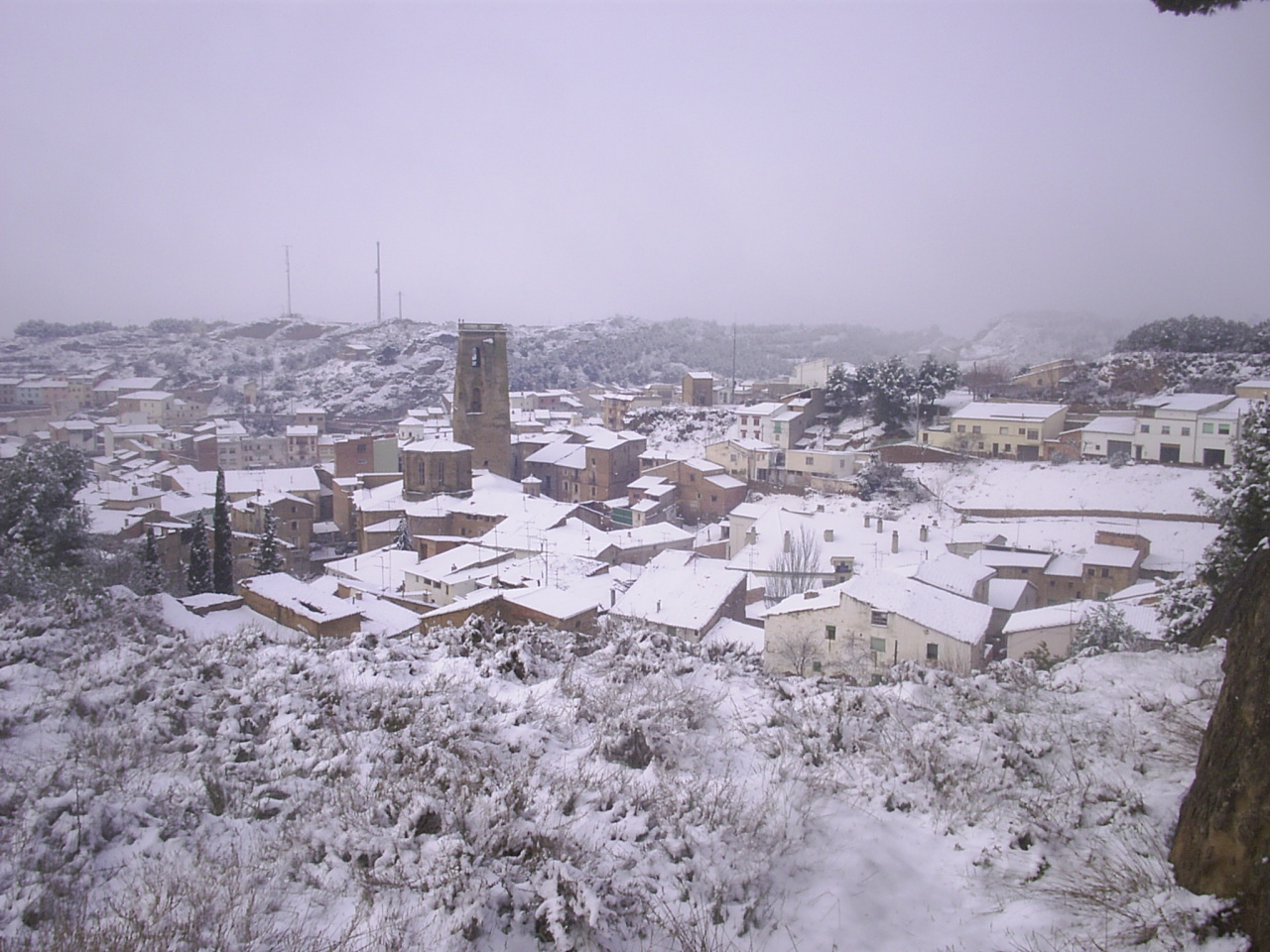 Tamarite de Litera (Huesca, España) nevado